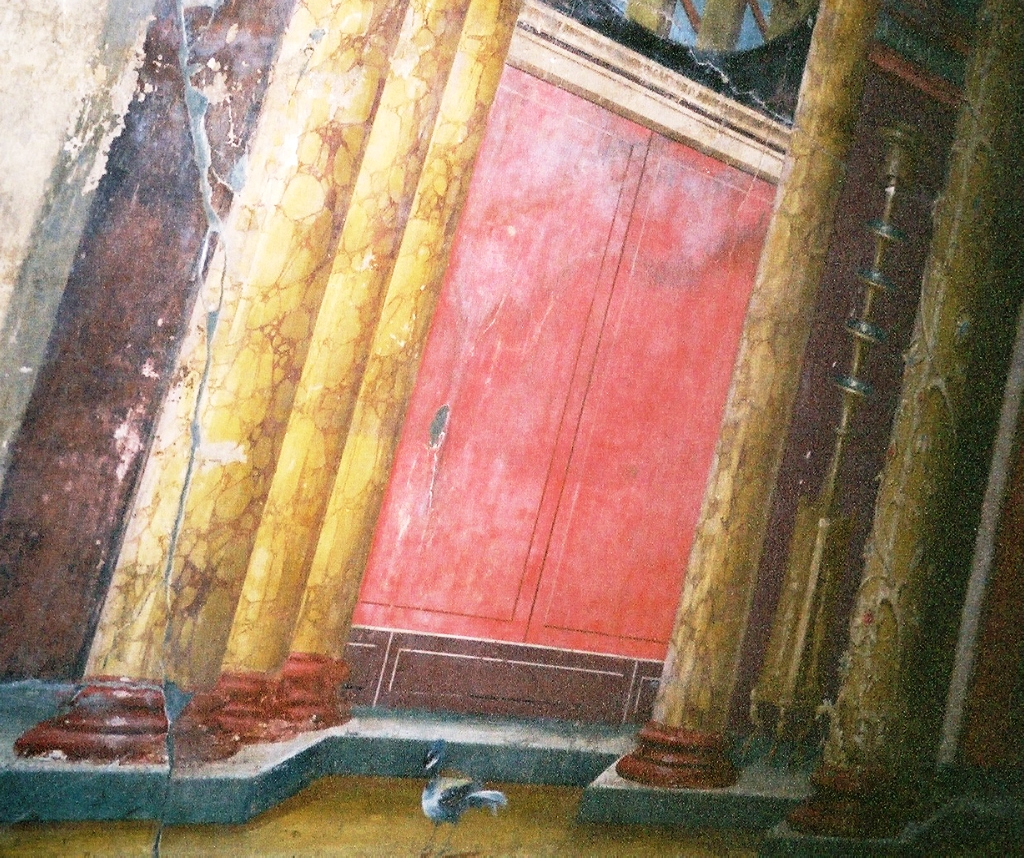 Détail d'une fresque de la villa de Poppée (Italie)